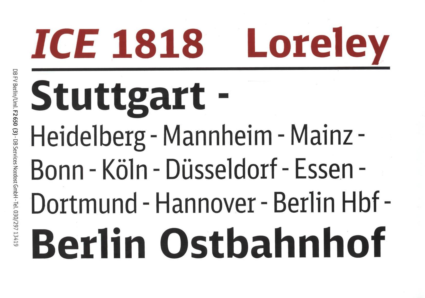 Zuglaufschild der Deutschen Bahn des ICE 1818 Loreley von 2007